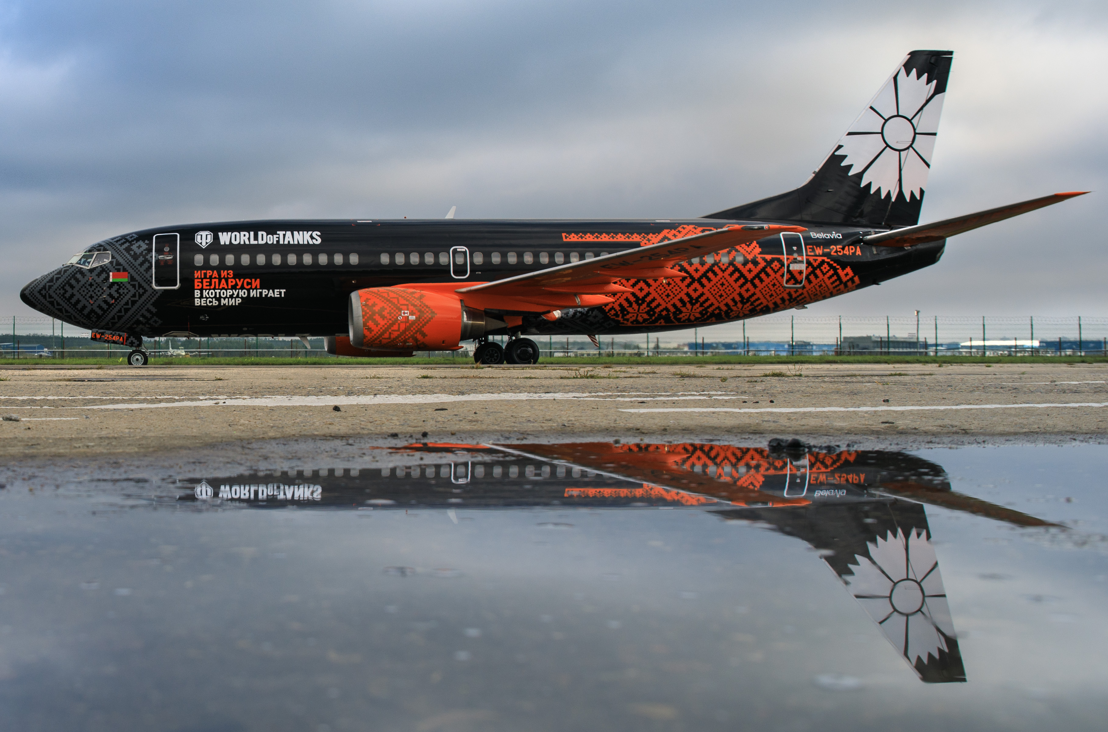 Фото сделано на открытии рейса авиакомпании в аэропорт "Жуковский" в сентябре 2016 года.